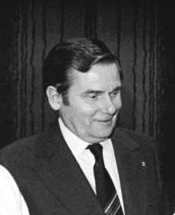 ADN-ZB Mittelstädt 14.12.80 Berlin: Auszeichnung "DDR-Sportler des Jahres 1980"-Zu einem herzlichen Gespräch nach der Ausezichnung im "Palasthotel" kam es zwischen Egon Krenz, Kandidat des Politbüros des ZK der SED und 1. Sekretär des FDJ-Zentralrates (R.), dem Präsidenten des DTSB der DDR, Manfred Ewald, (2.v.l.) und der "DDR-Sportlerin des Jahres 1980", Turn-Olympiasiegerin Maxi Gnauck (3.v.l.), dem "DDR-Sportler des Jahres 1980", Marathon-Olympiasieger Waldemar Cierpinski (l.) und den Mitgliedern der "DDR-Mannschaft des Jahres 1980", dem Olympiasieger im Handball, Rainer Höft (4.v.l.) und Siegfried Voigt (2.v.r.).